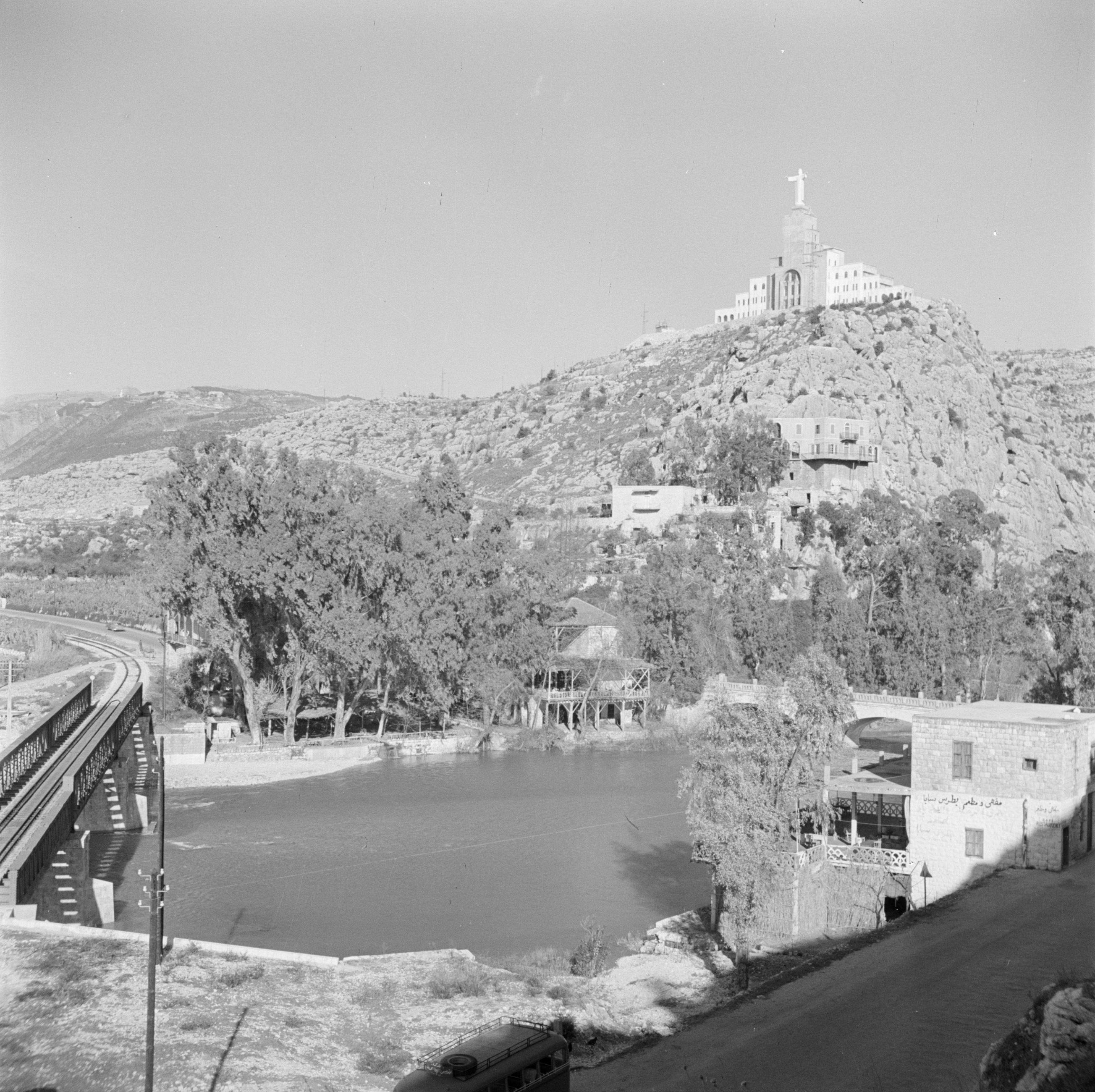 Collectie / Archief : Fotocollectie Van de Poll Reportage / Serie : Midden-Oosten 1950-1955: Libanon Beschrijving : Christusbeeld op de heuvel boven Nahr el Kelb Datum : 1950 Locatie : Libanon, Nahr El Kelb Trefwoorden : beelden, dorpen Fotograaf : Poll, Willem van de Auteursrechthebbende : Nationaal Archief Materiaalsoort : Negatief (zwart/wit) Nummer archiefinventaris : bekijk toegang 2.24.14.02 Bestanddeelnummer : 255-6414